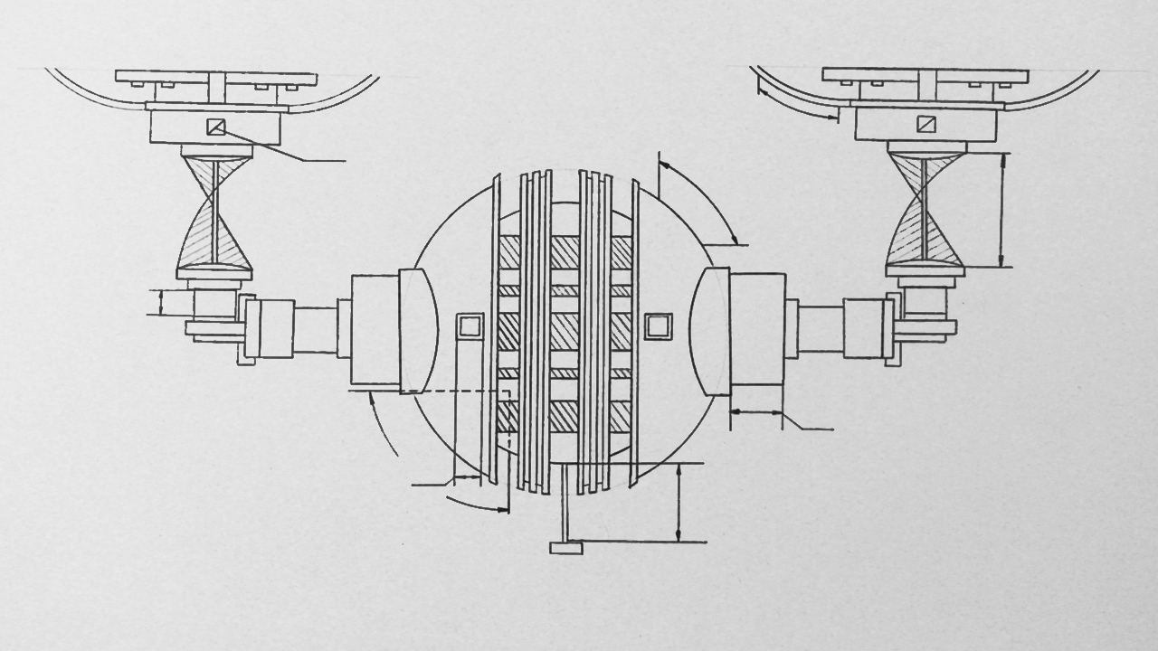 "Машина смерти", из игры Evil Delusion